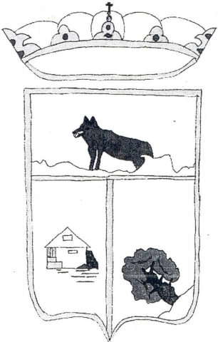 Escudo de La Loberuela